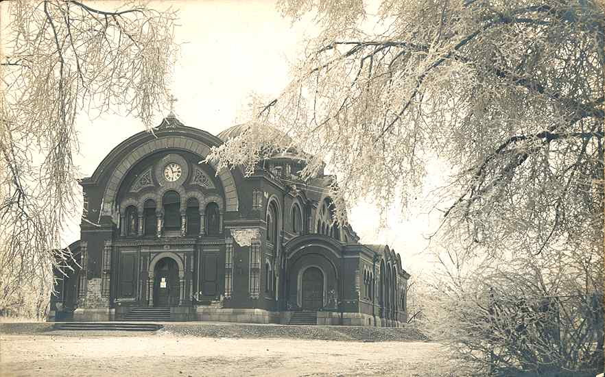 Брестский Никольский гарнизонный собор в 1915 году